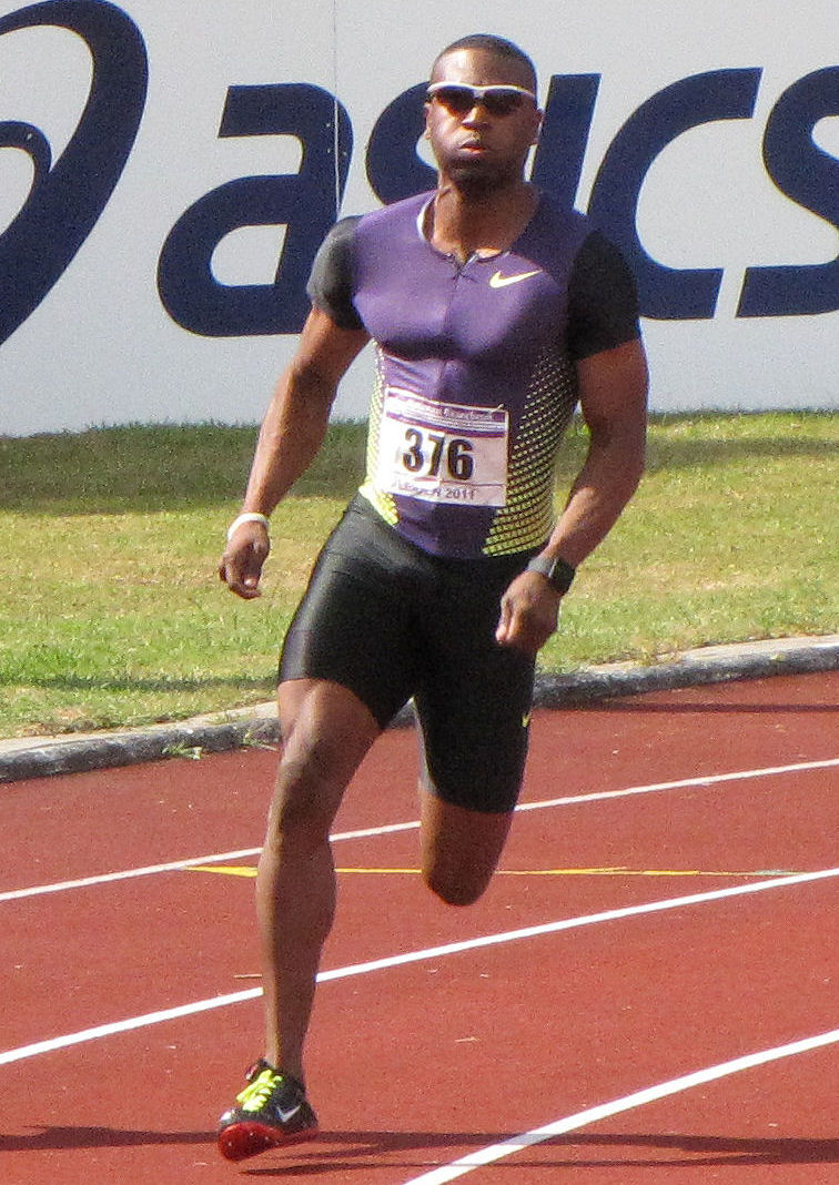 Gouden Spike Meeting 2011, 200 Meter, 4. Lauf: Manteo Mitchell